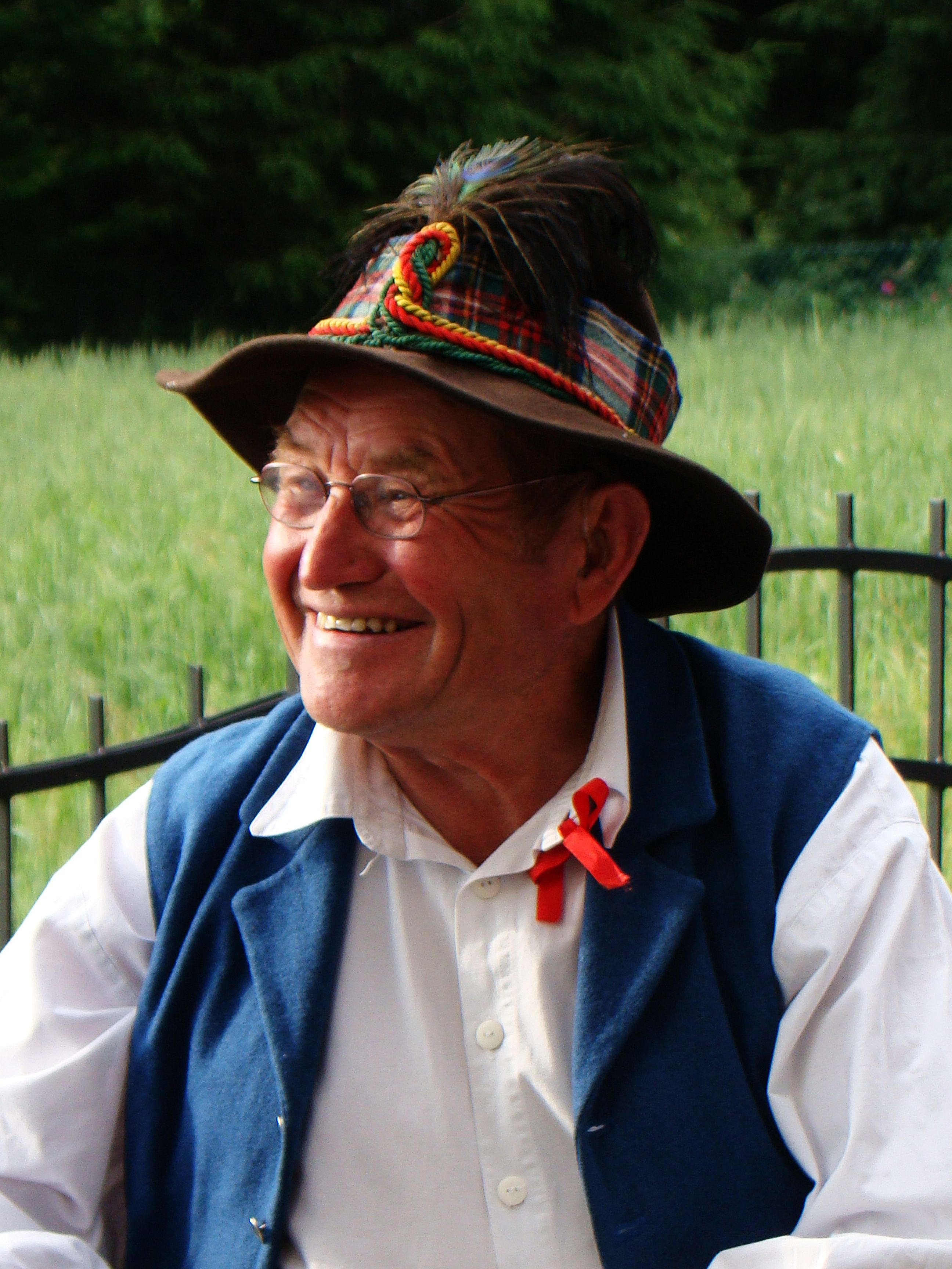 Bei den Walddeutschen